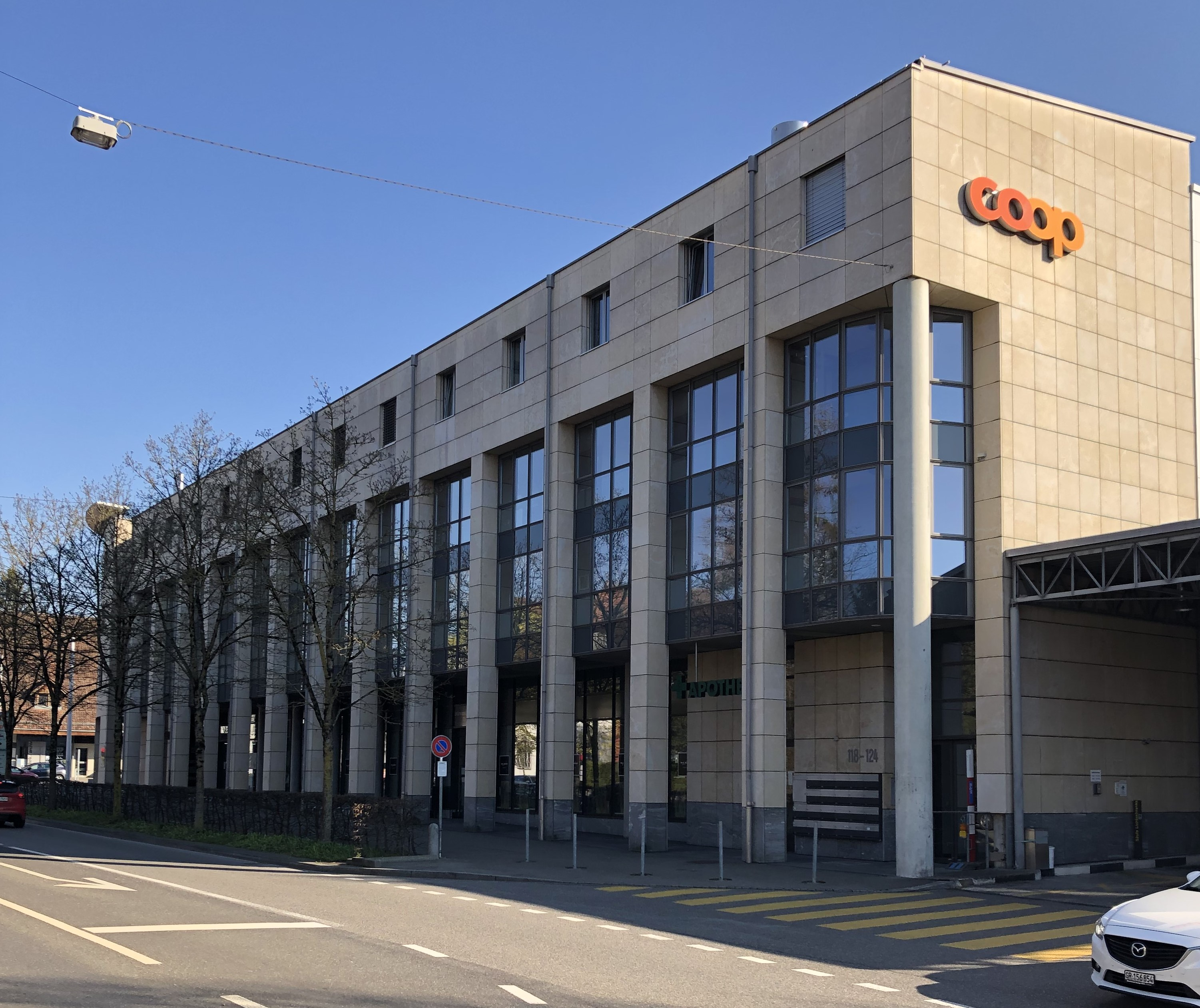 Bümpliz Dorf Coop Gebäude